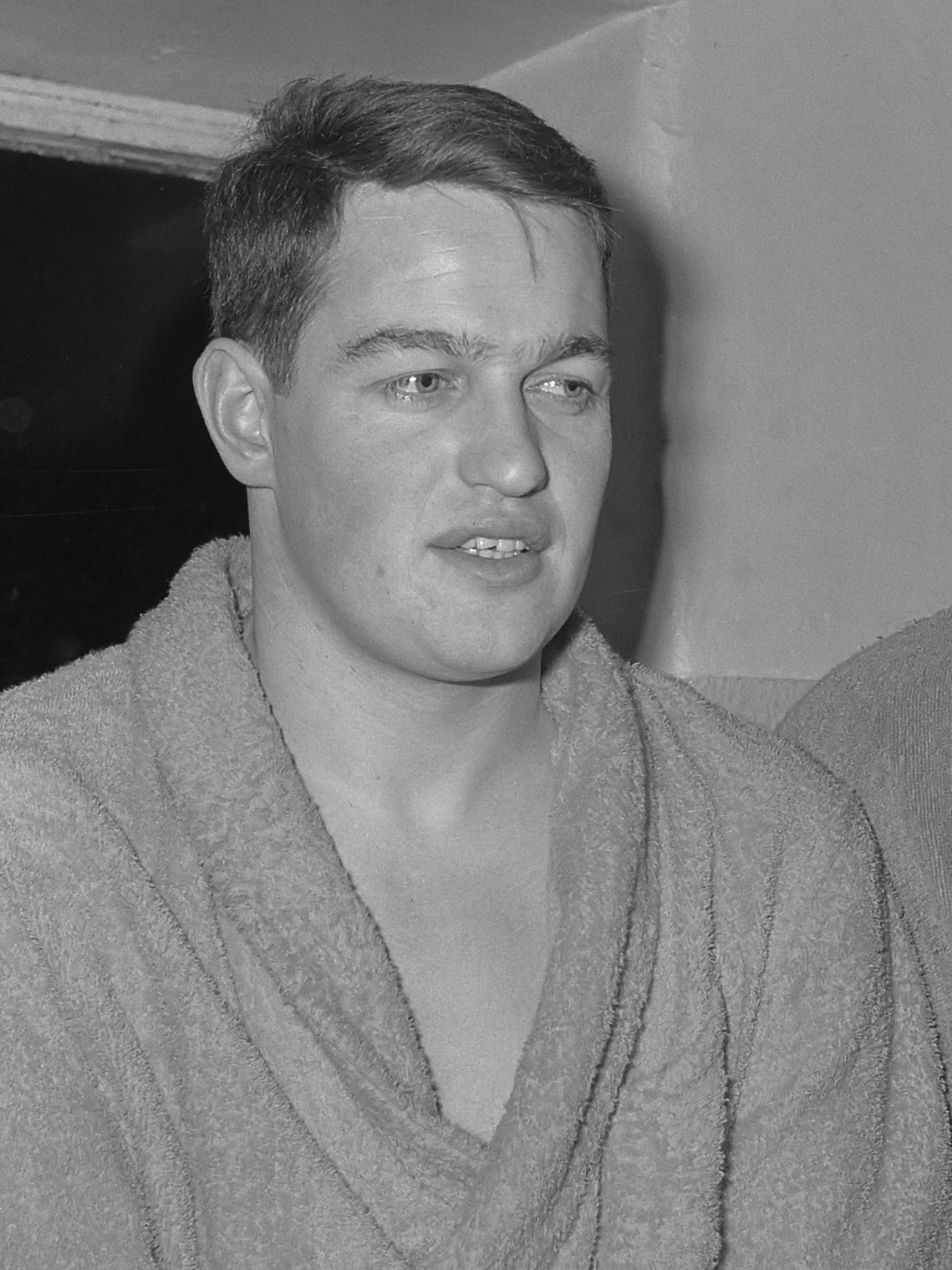 Training Nederlandse waterpolozevental begonnen, links Van Springelen , rechts Heunsen (keeper) 1 februari 1964